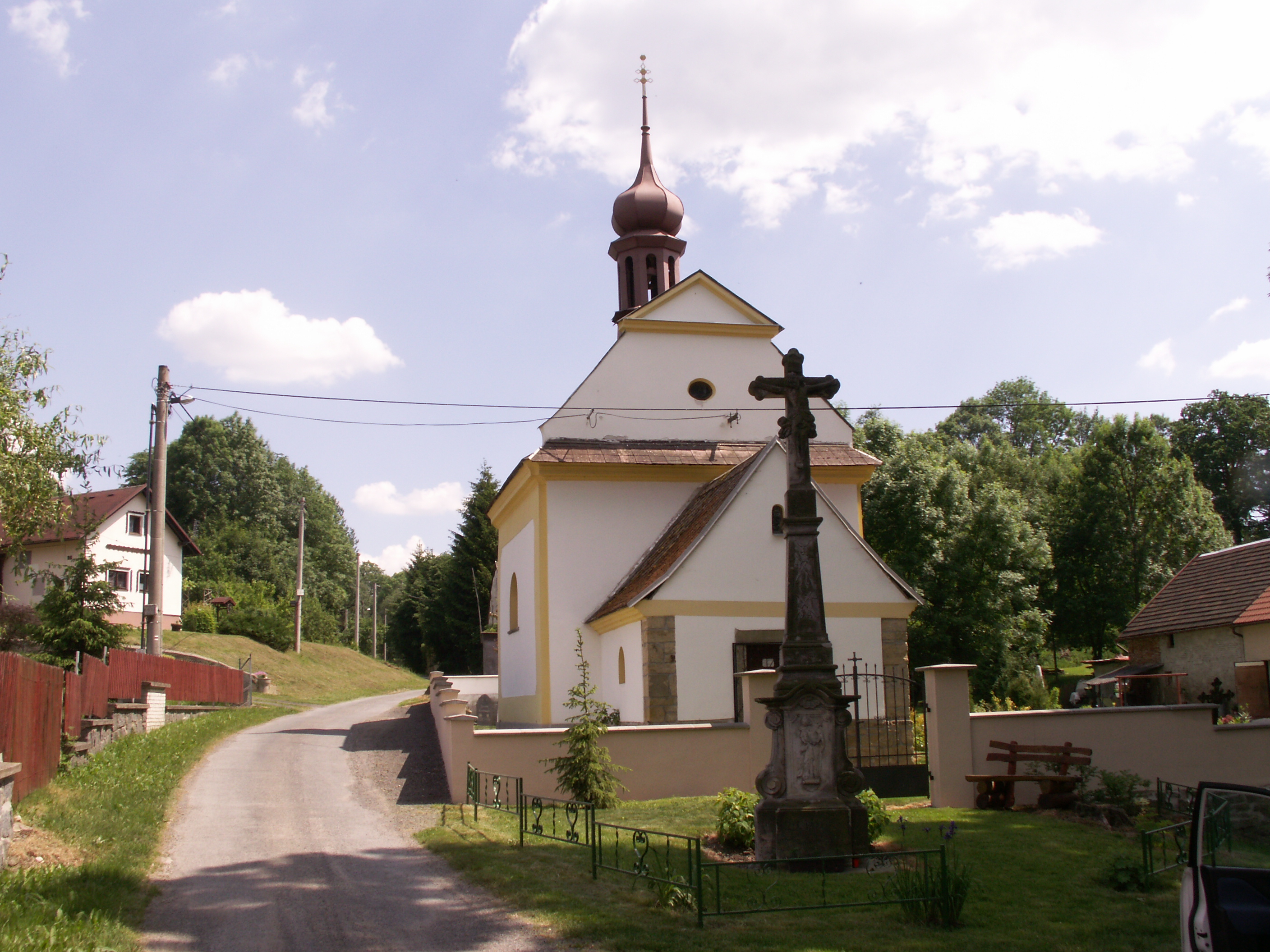 Helvíkov, část obce Anenská Studánka v okrese Ústí nad Orlicí, kaple Panny Marie